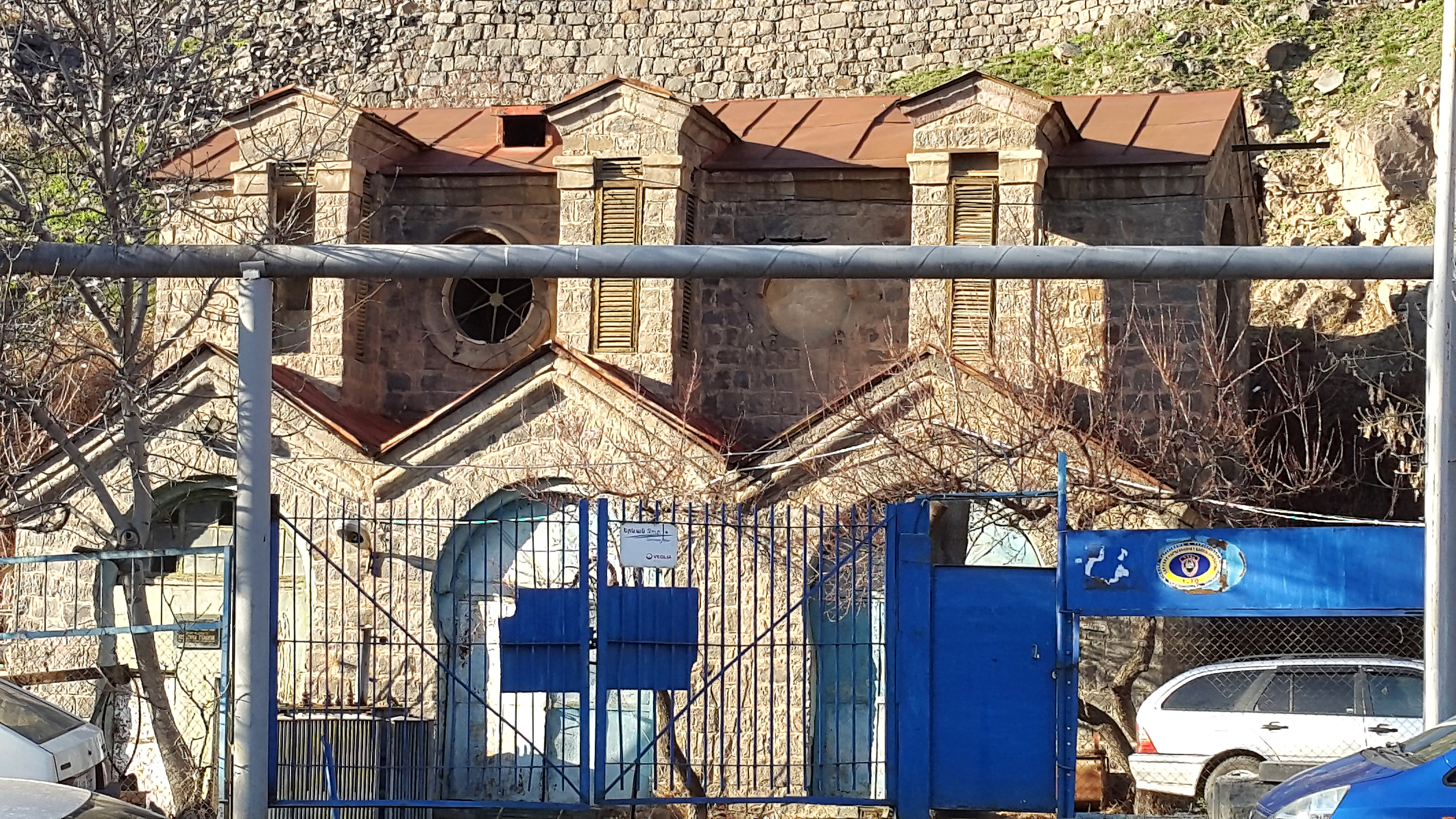 Երևանի առաջին ՀԷկ-ի շենքը